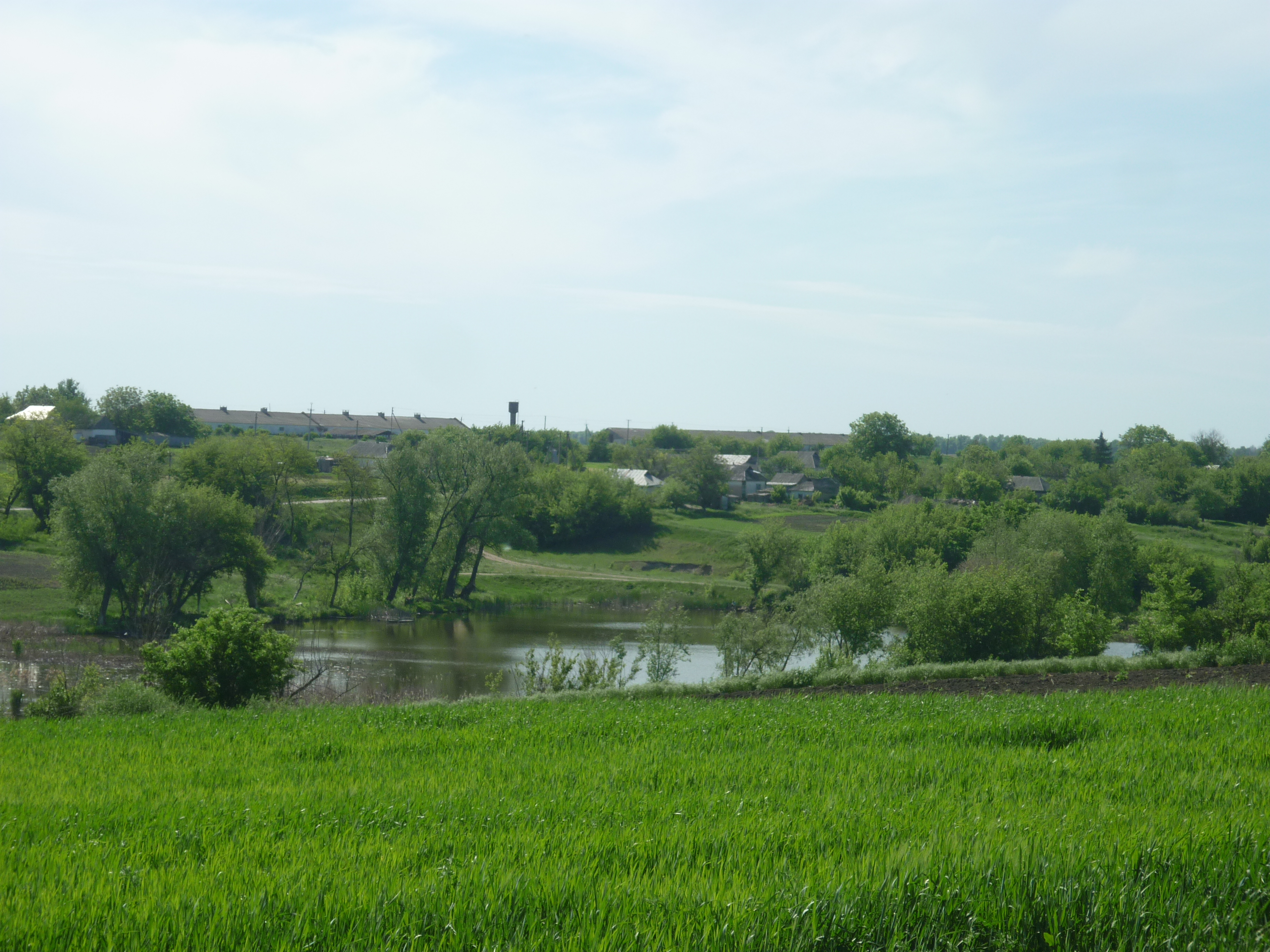 Ставок та річка Синька у селі Синьки Ульяновського району Кіровоградської обалсті